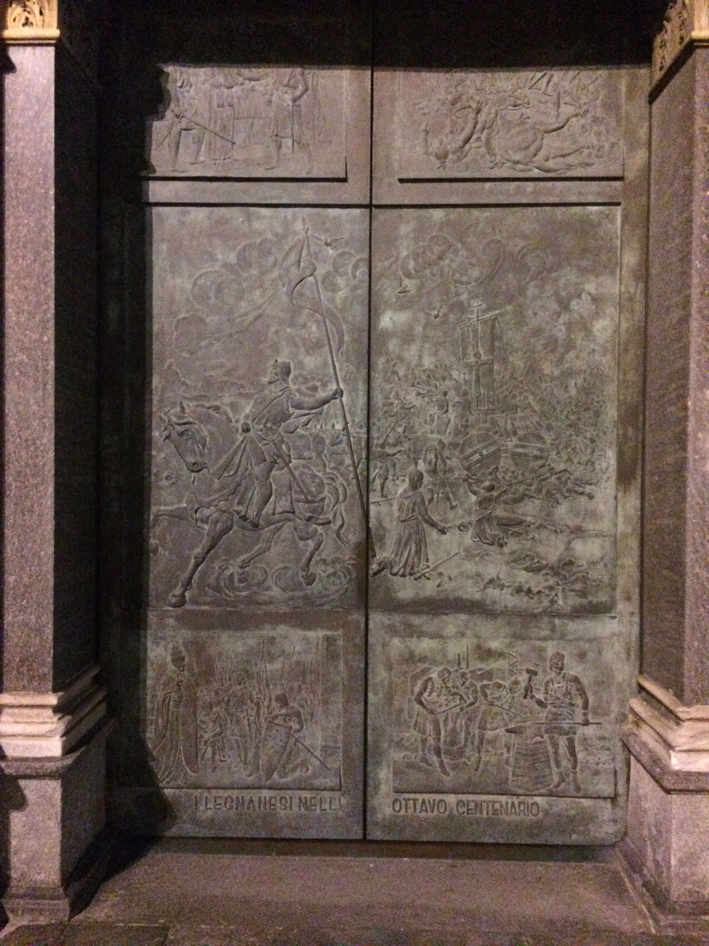 La porta d'ingresso principale della basilica di San Magno